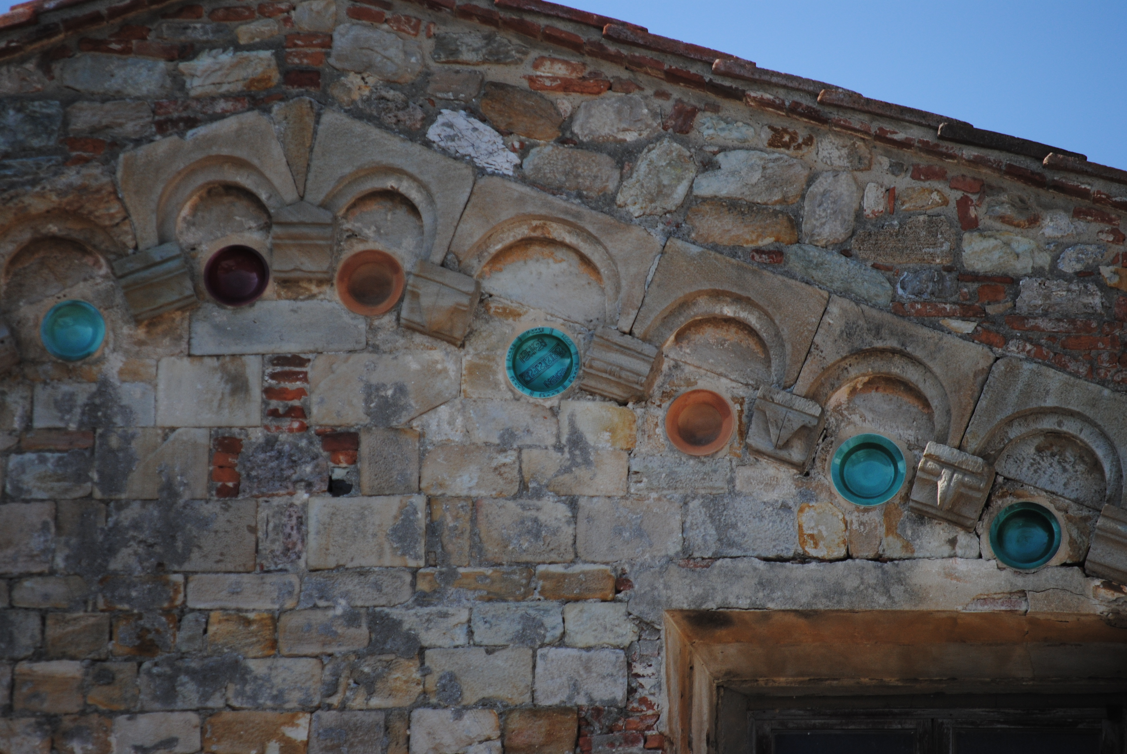 Bacini ceramici posti come decorazione architettonica sulle mura esterne della navata centrale (partiolcare).